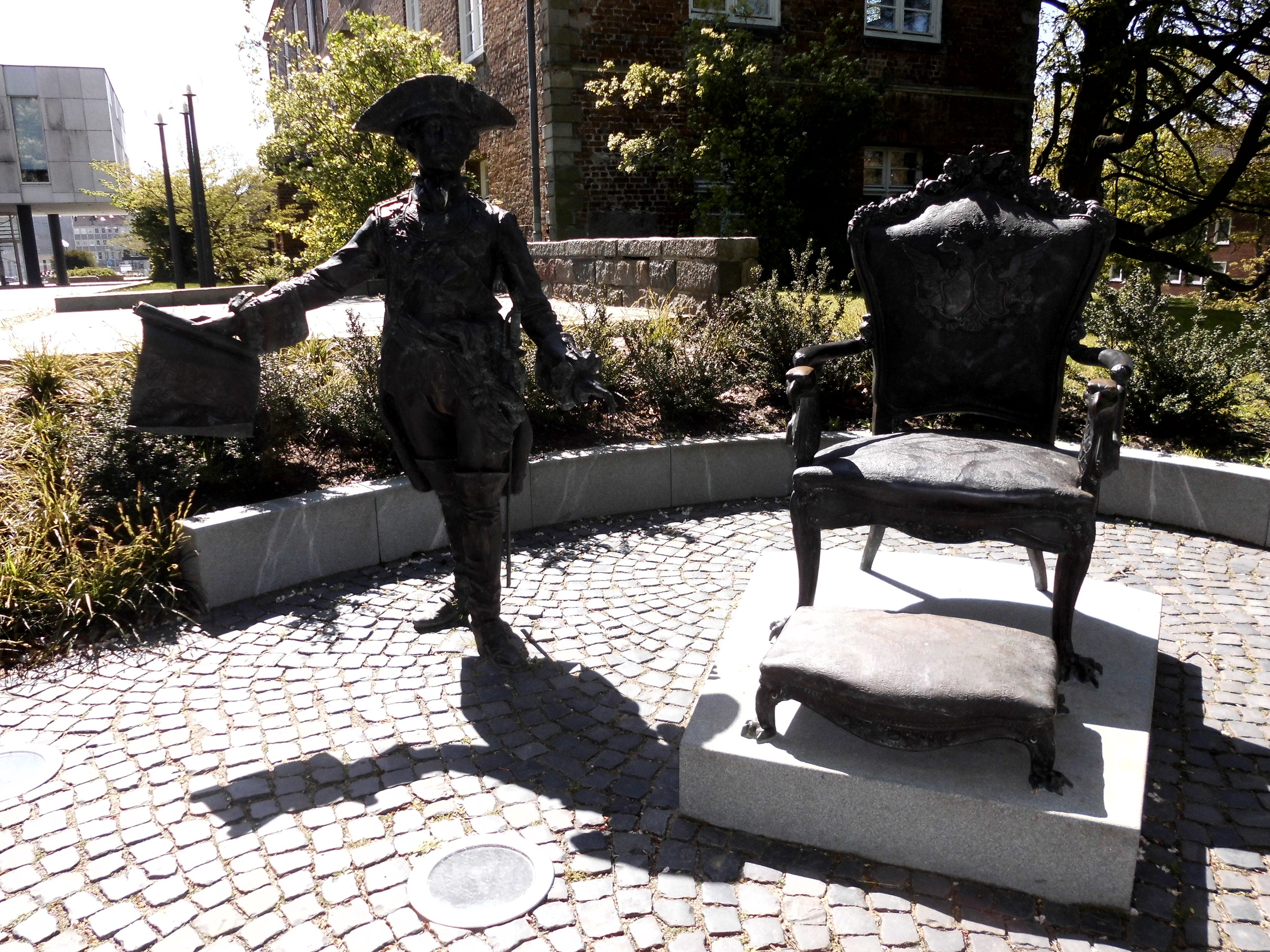 Plastik des Zaren Peter III. von Rußland im Kieler Stadtteil Altstadt.